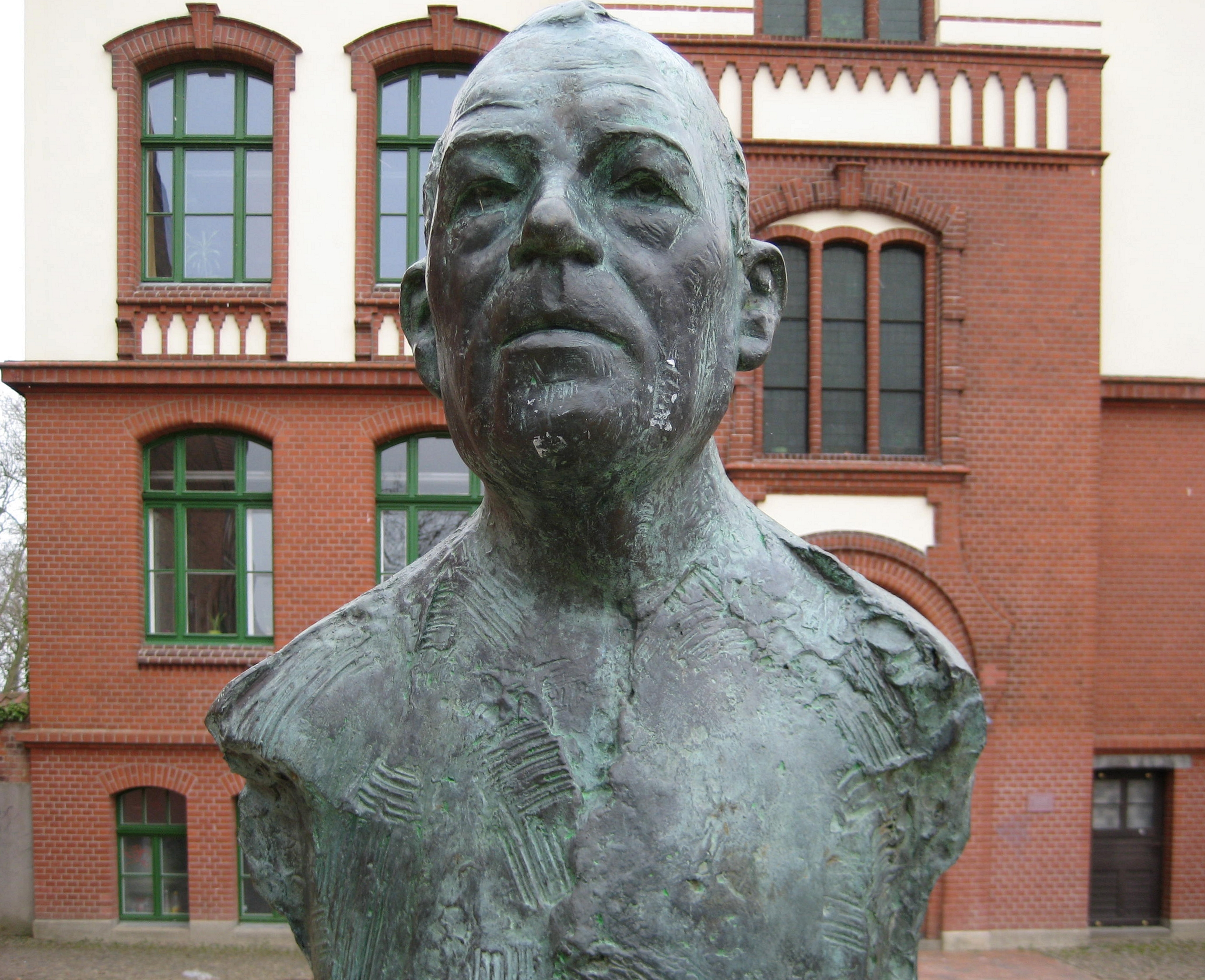 Detail der Skulptur Uwe Johnsons von Wieland Förster vor dem John-Brinckman-Gymnasium in Güstrow